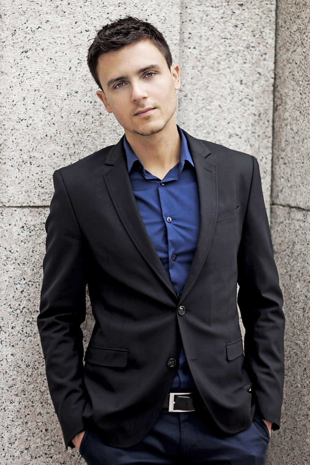 Jakub Starý (foto: Danny Worm)